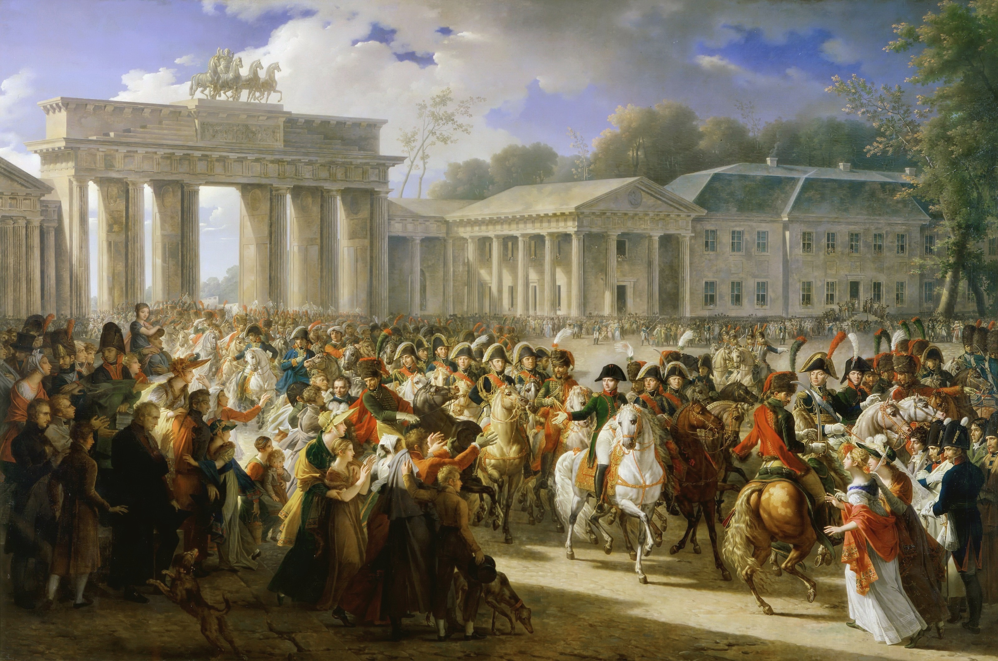 Einzug Napoleons an der Spitze seiner Truppen durch das Brandenburger Tor, nach der siegreichen Schlacht bei Jena und Auerstedt. Berlin, 27. Oktober 1806.